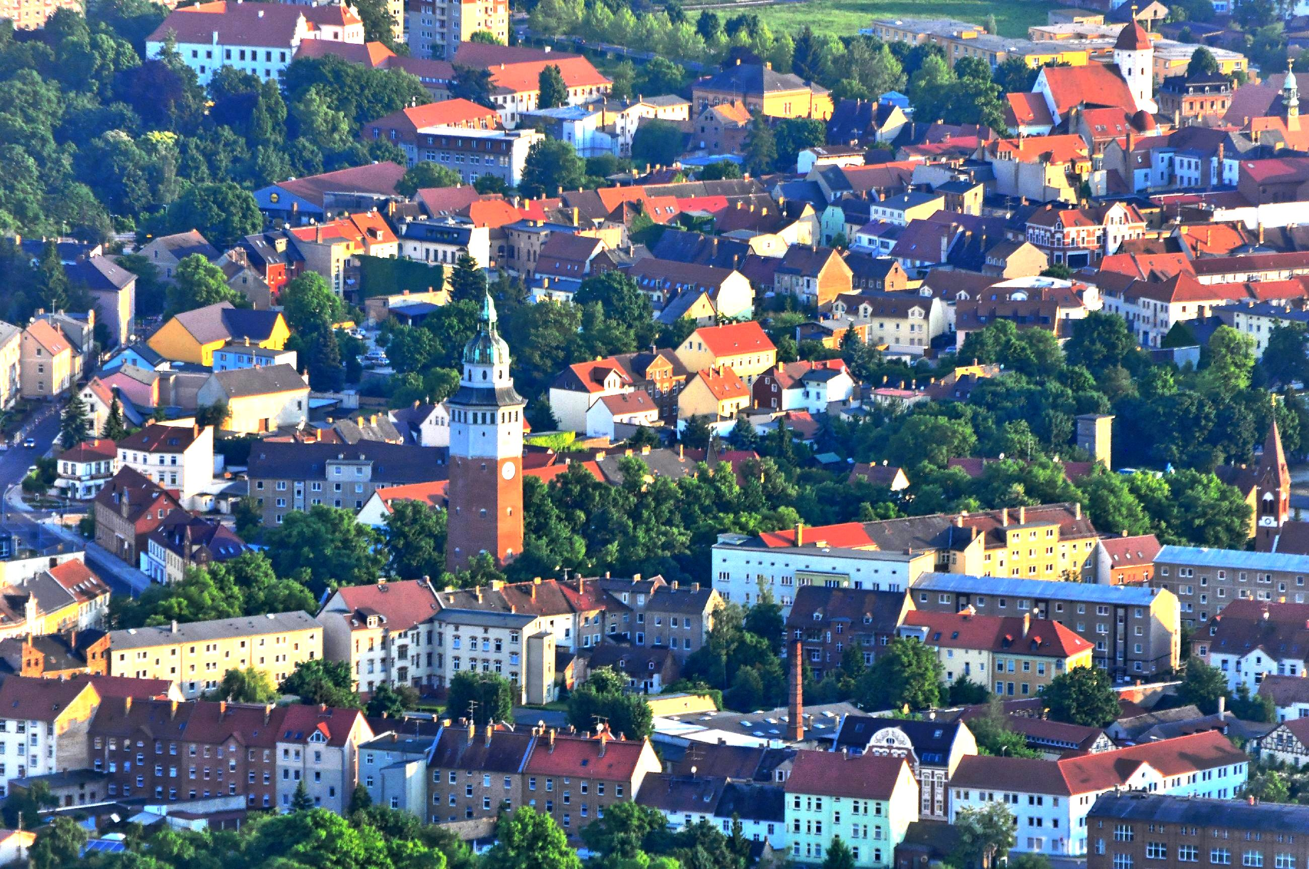 Luftaufnahme von Finsterwald; Überführungsflug vom Flugplatz Nordholz-Spieka über Lüneburg, Potsdam zum Flugplatz Schwarzheide-Schipkau